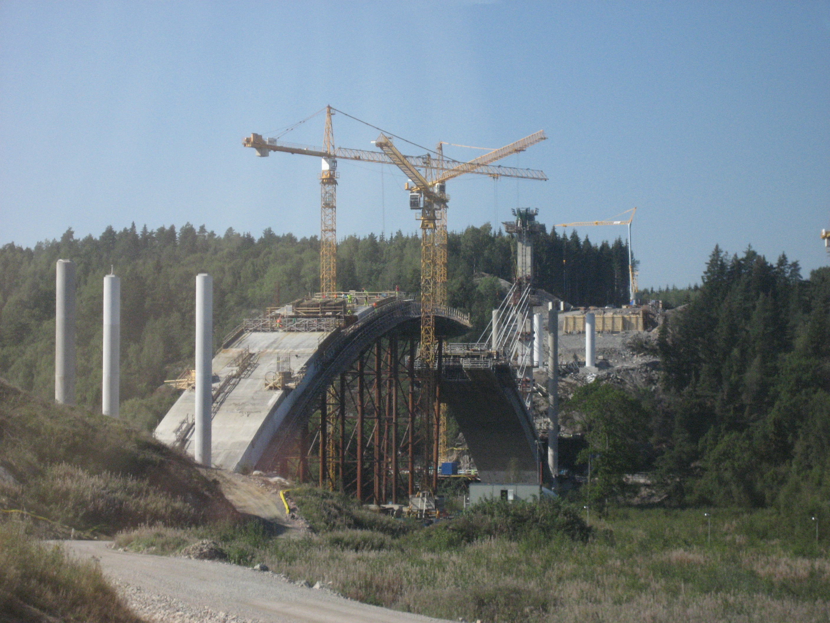 Image Ørekils Bridge